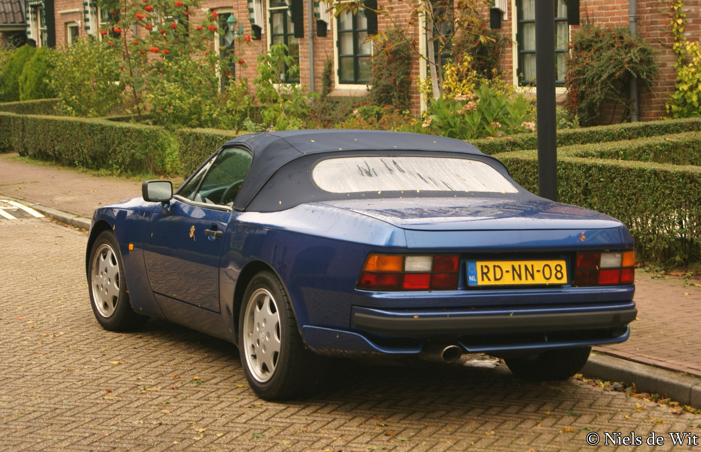 RD-NN-08